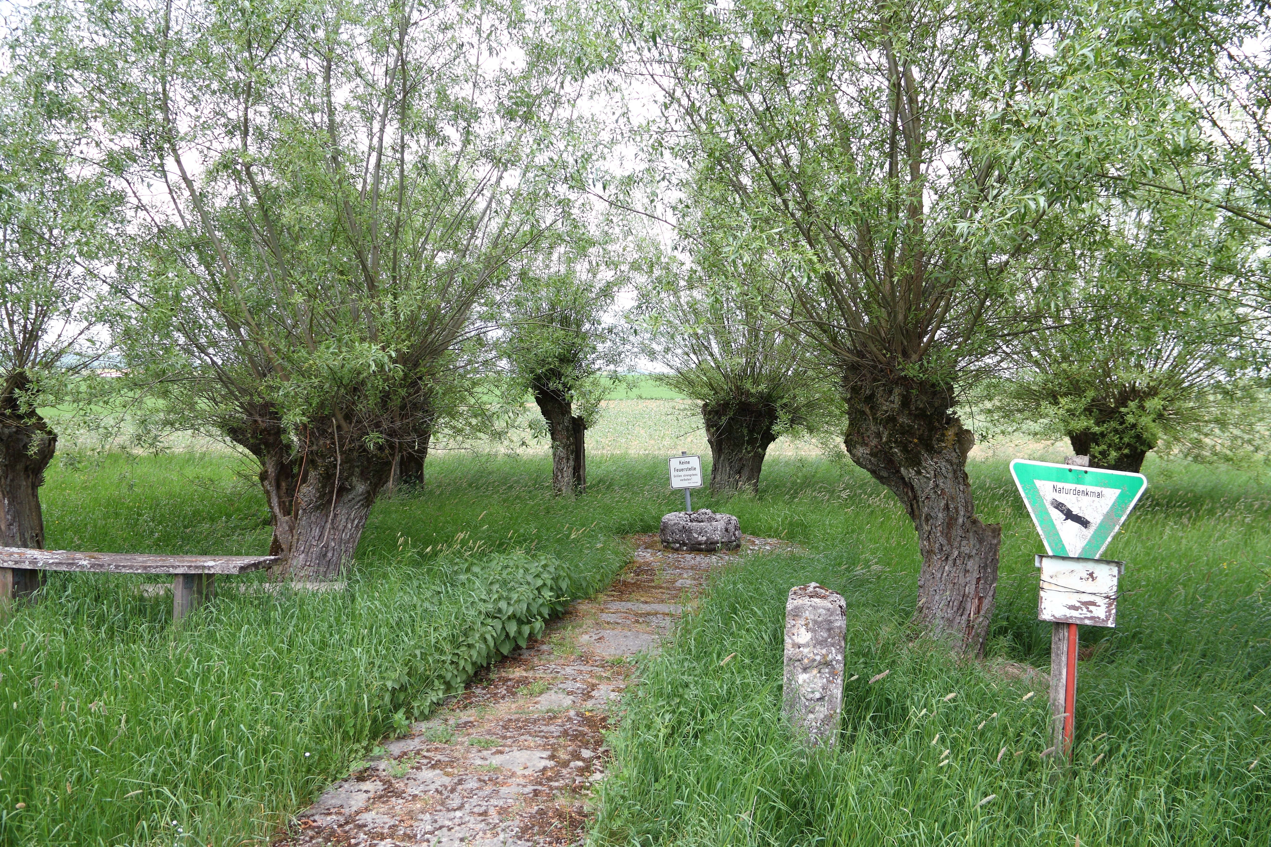 Die Kopfweidengruppe mit Taufstein aus dem 2.–3. Jahrh. Selberten in der Nähe des Creglinger Ortsteils Oberrimbach. SGNr. 81280200031.